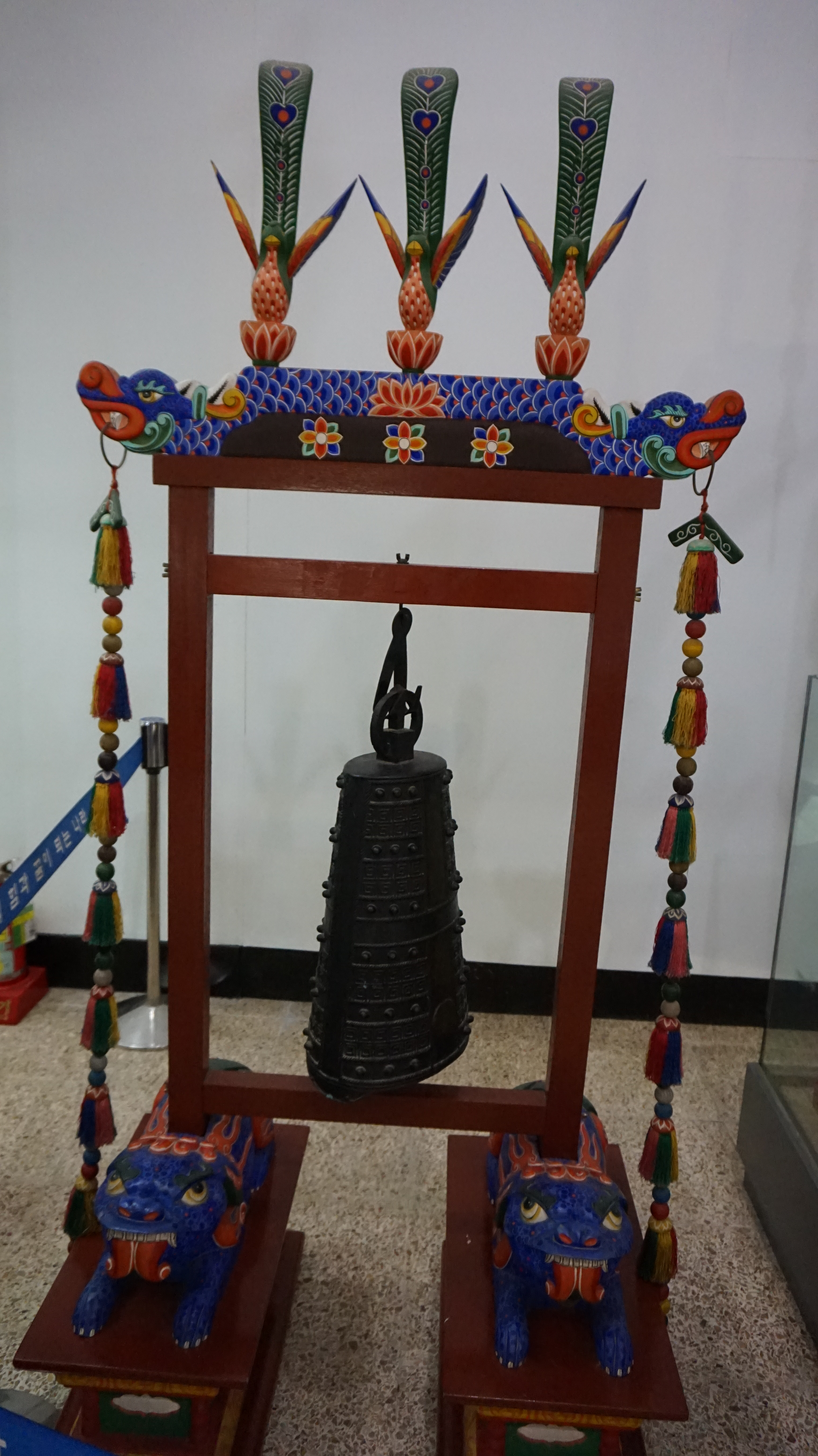 특종 (1)